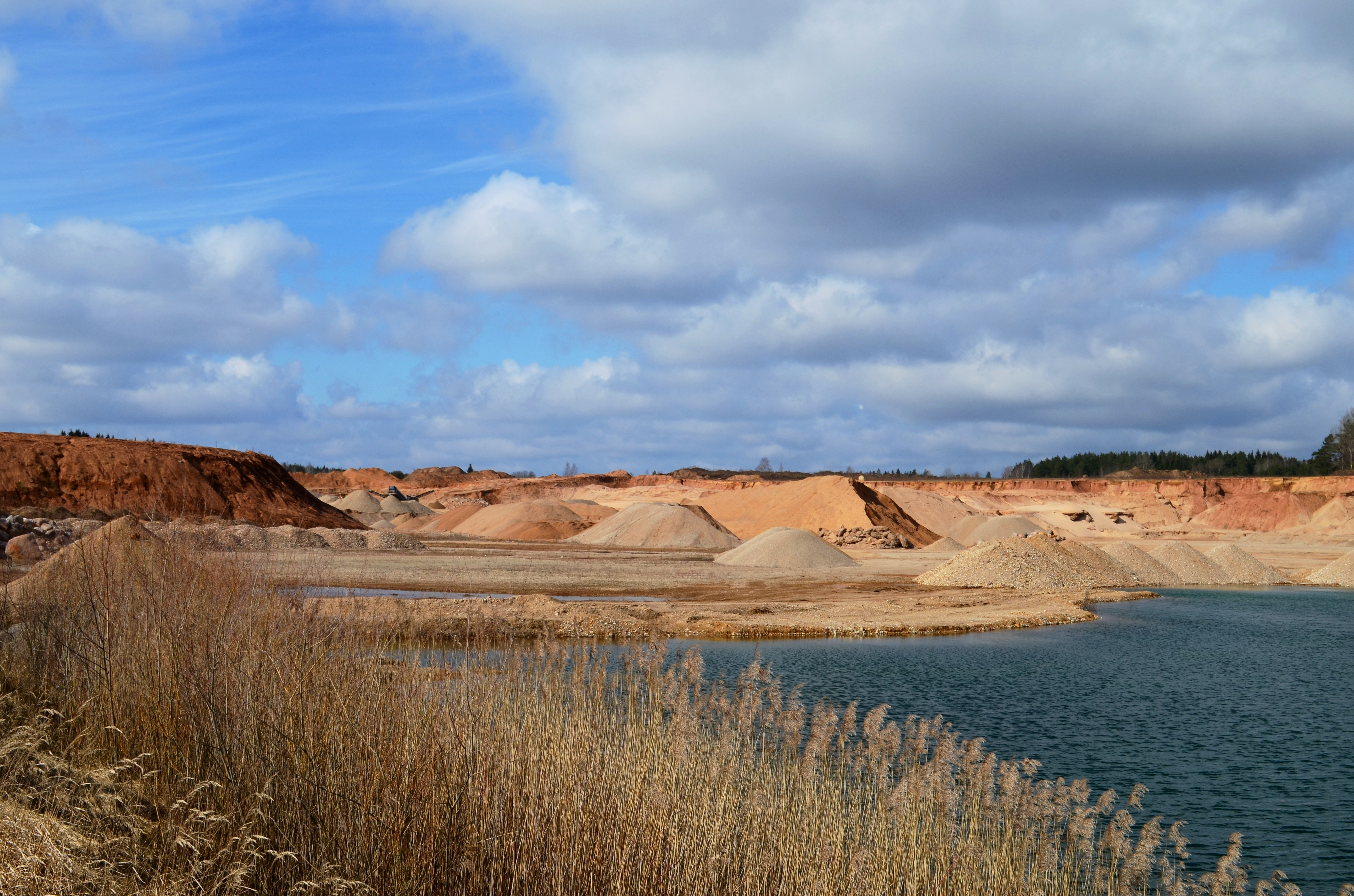 Kurklių karjeras, Anykščių raj.